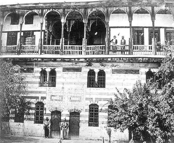 منزل سيدي حميد وليم همرشميدت 1860